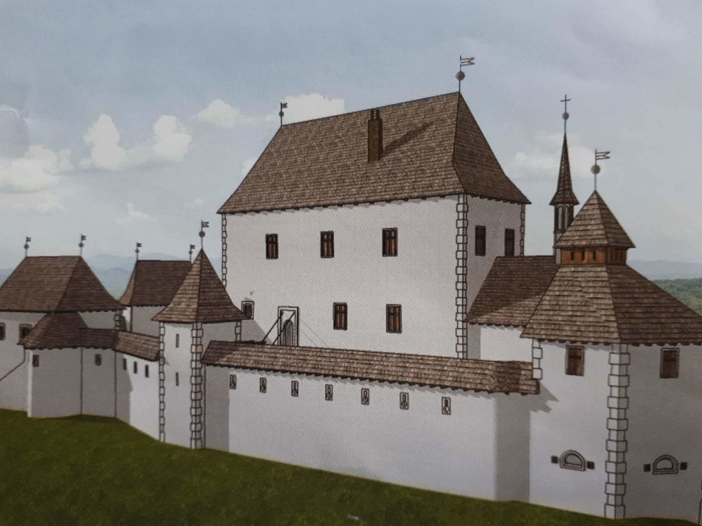 Rekonstrukciju je napravio Rok Kranjc, slovenski istraživač srednjevjekovnih utvrda, prema originalnim nacrtima iz 16. stoljeća i prikazu kojeg je u 17. stoljeću napravio slovenski povjesničar Janez Vjkard Valavzor.